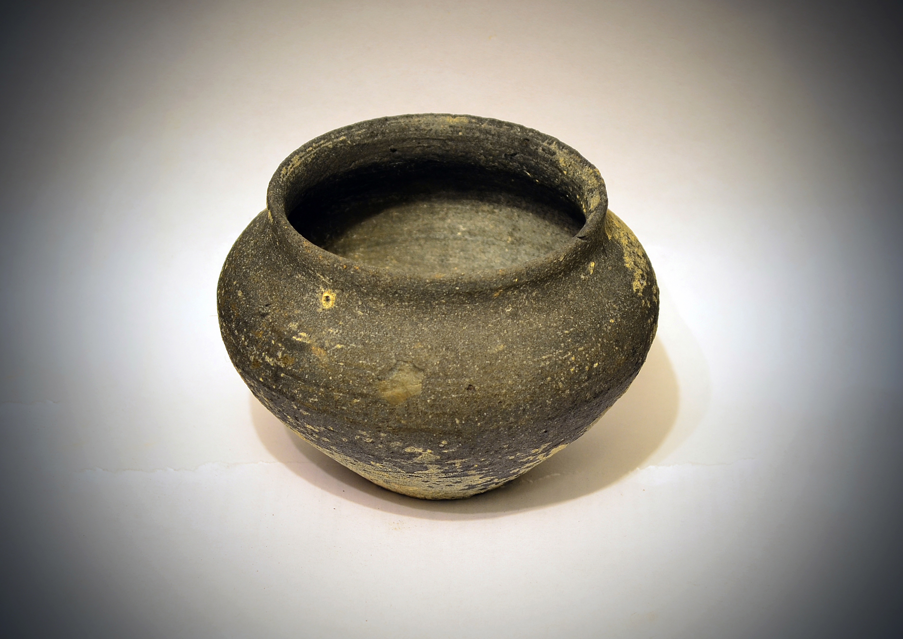 Горшок средневековый,Рязанское княжество,13-14 вв.